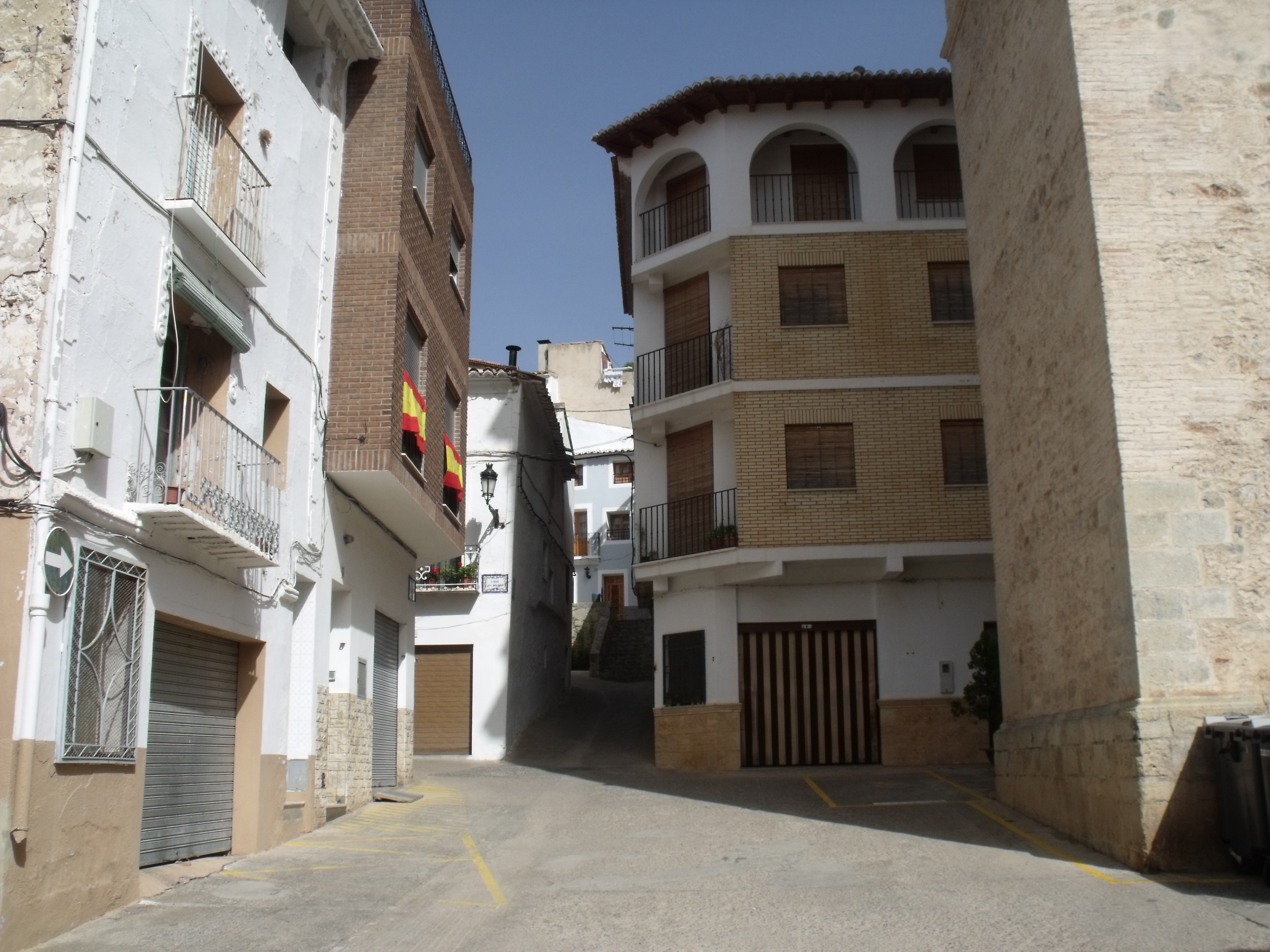 Calles del pueblo